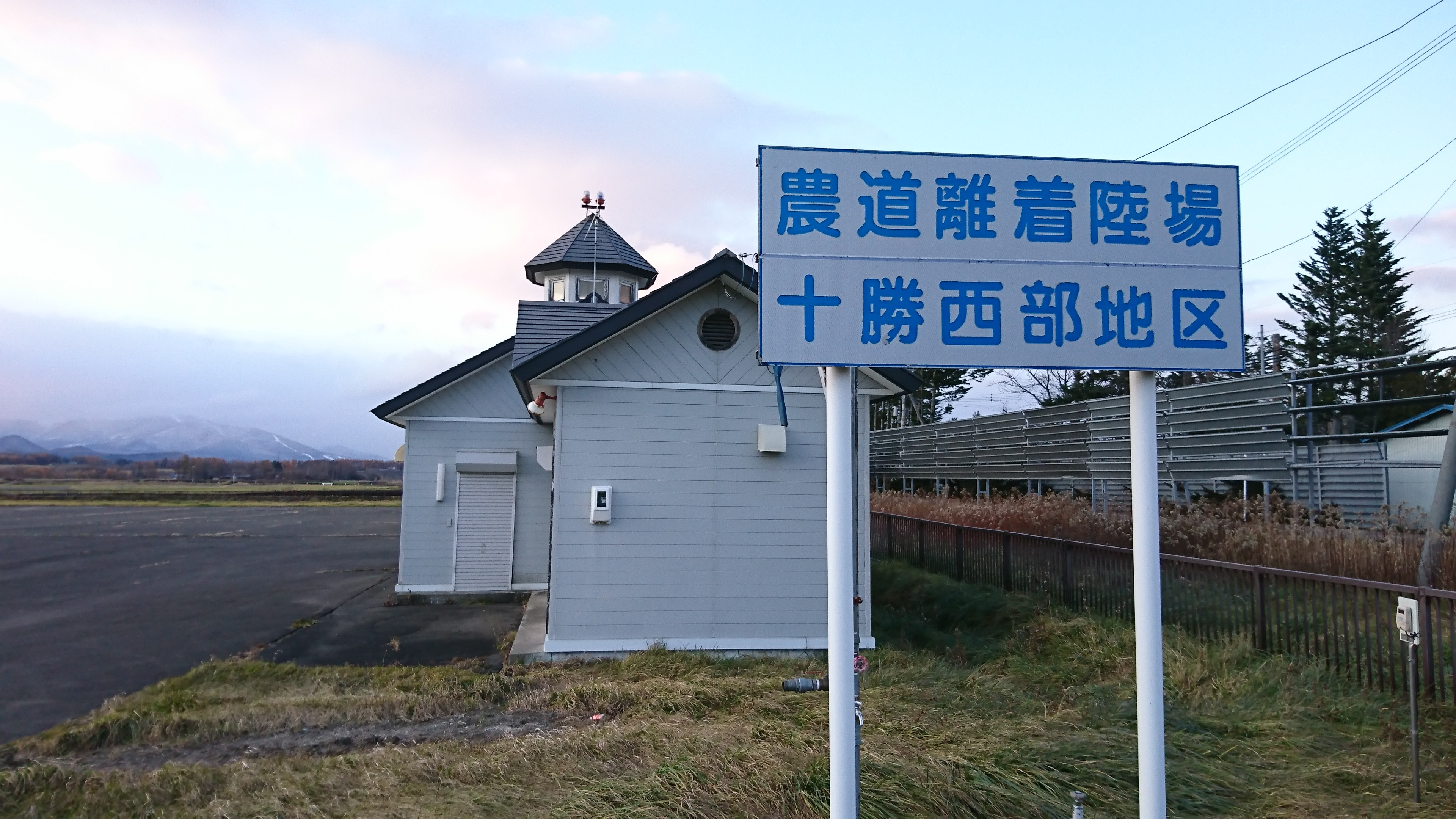 十勝西部地区離着陸場看板